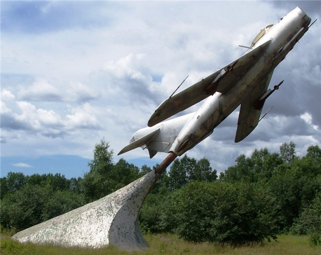 Самолет МИГ-17, установленный в честь военных летчиков